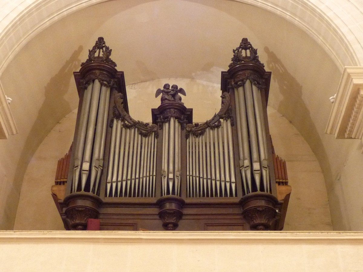 Orgue, église St-Jacques de l'Houmeau, Angoulême, France